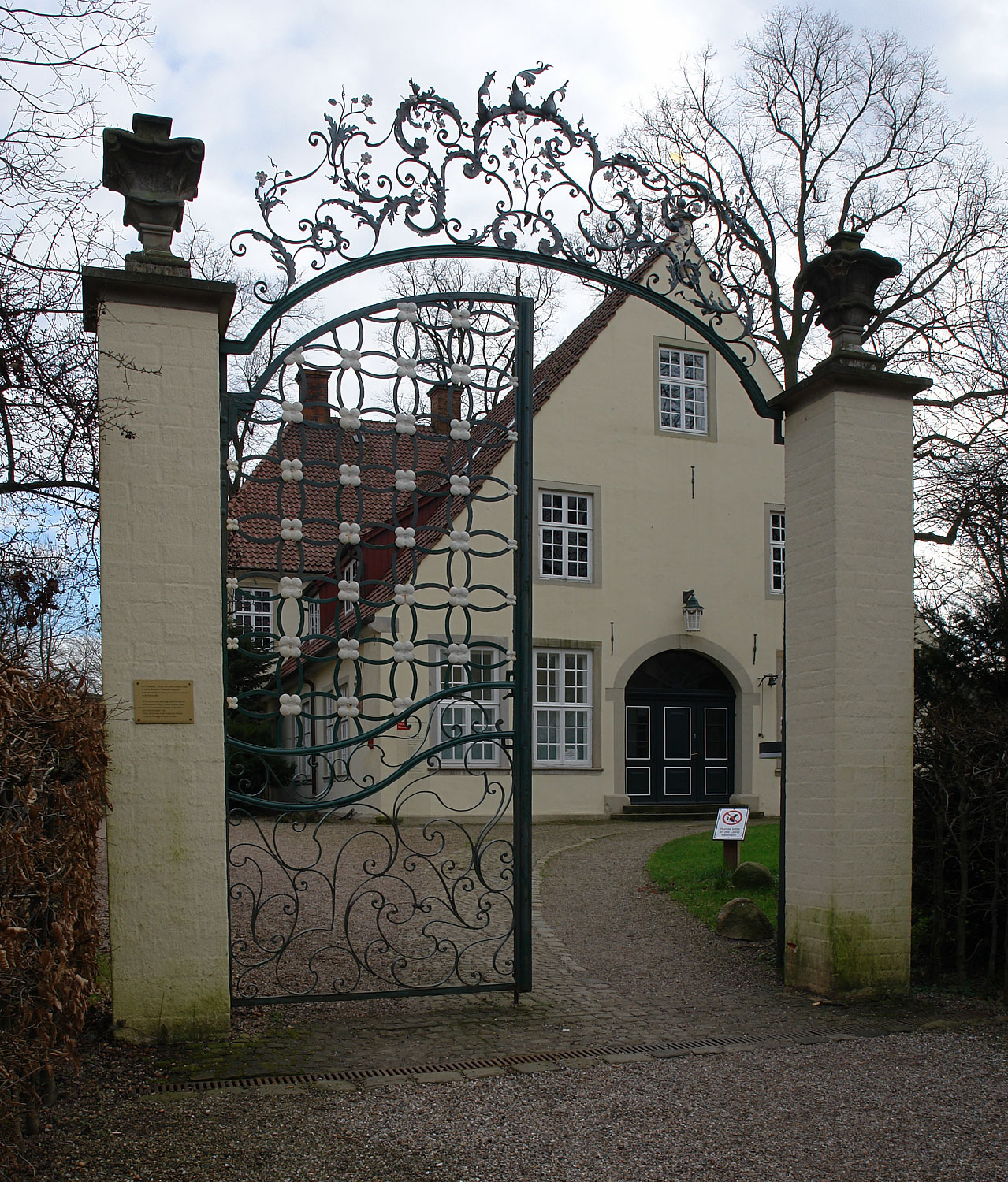 Focke-Museum Bremen: Franzosentor (1758) vor Haus Riensberg (zweite Hälfte 18. Jh.)